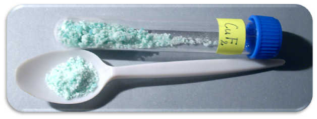 Fluorid měďnatý - CuF2